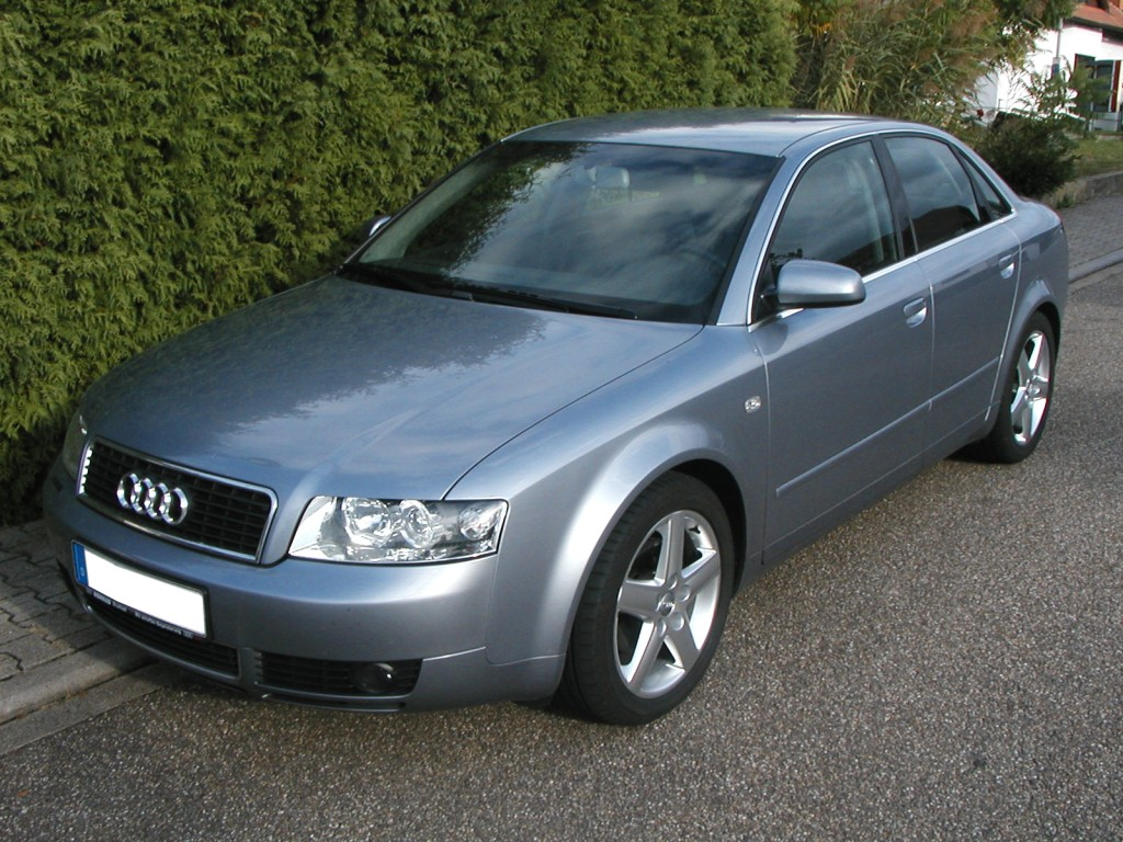 Audi A4 Limousine (Modell B6), akoyasilber